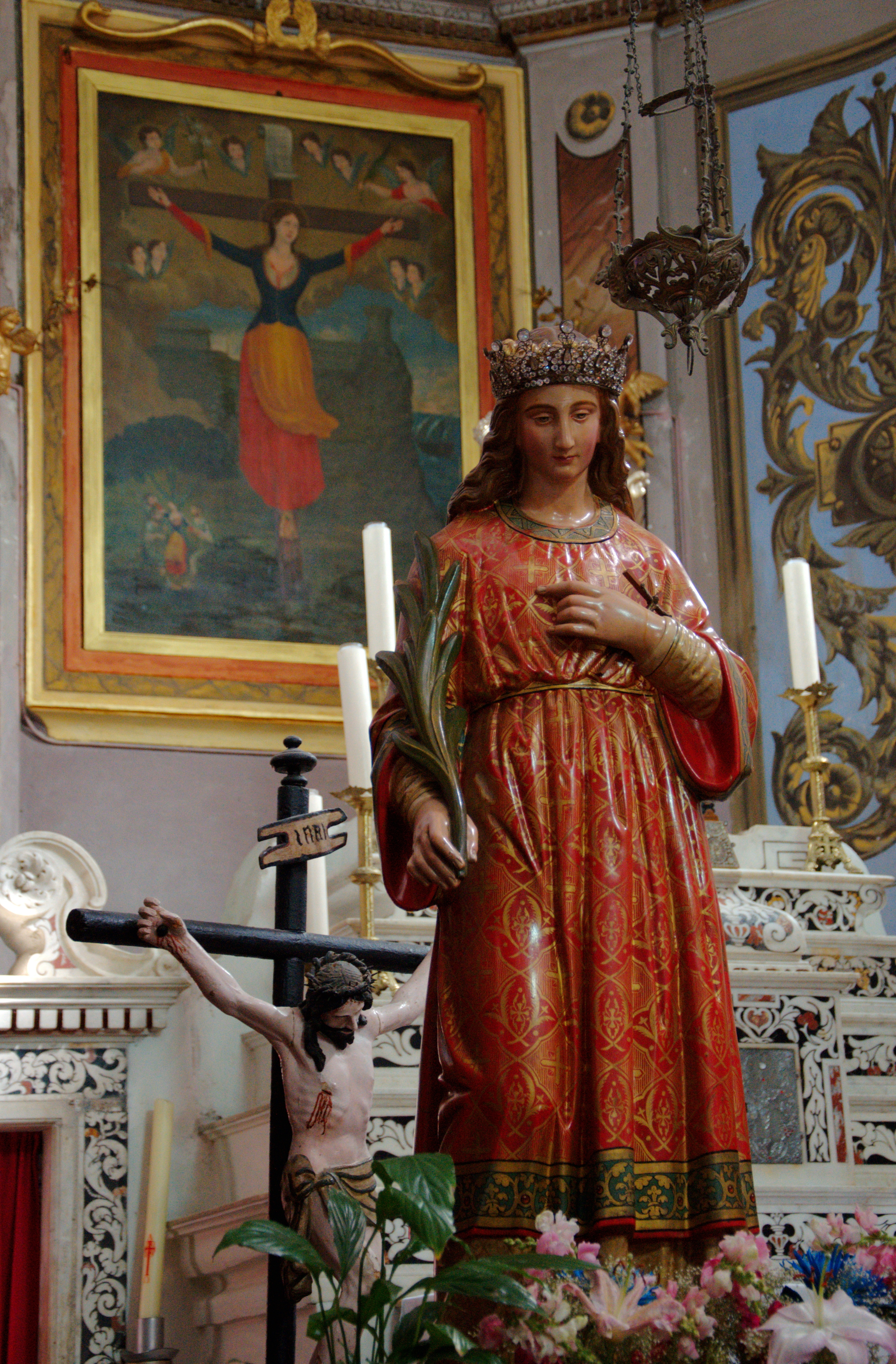 Статуя и картина с изображением мученичества святой Иулии Корсиканской в посвящённой ей католической церкви города Нонца.